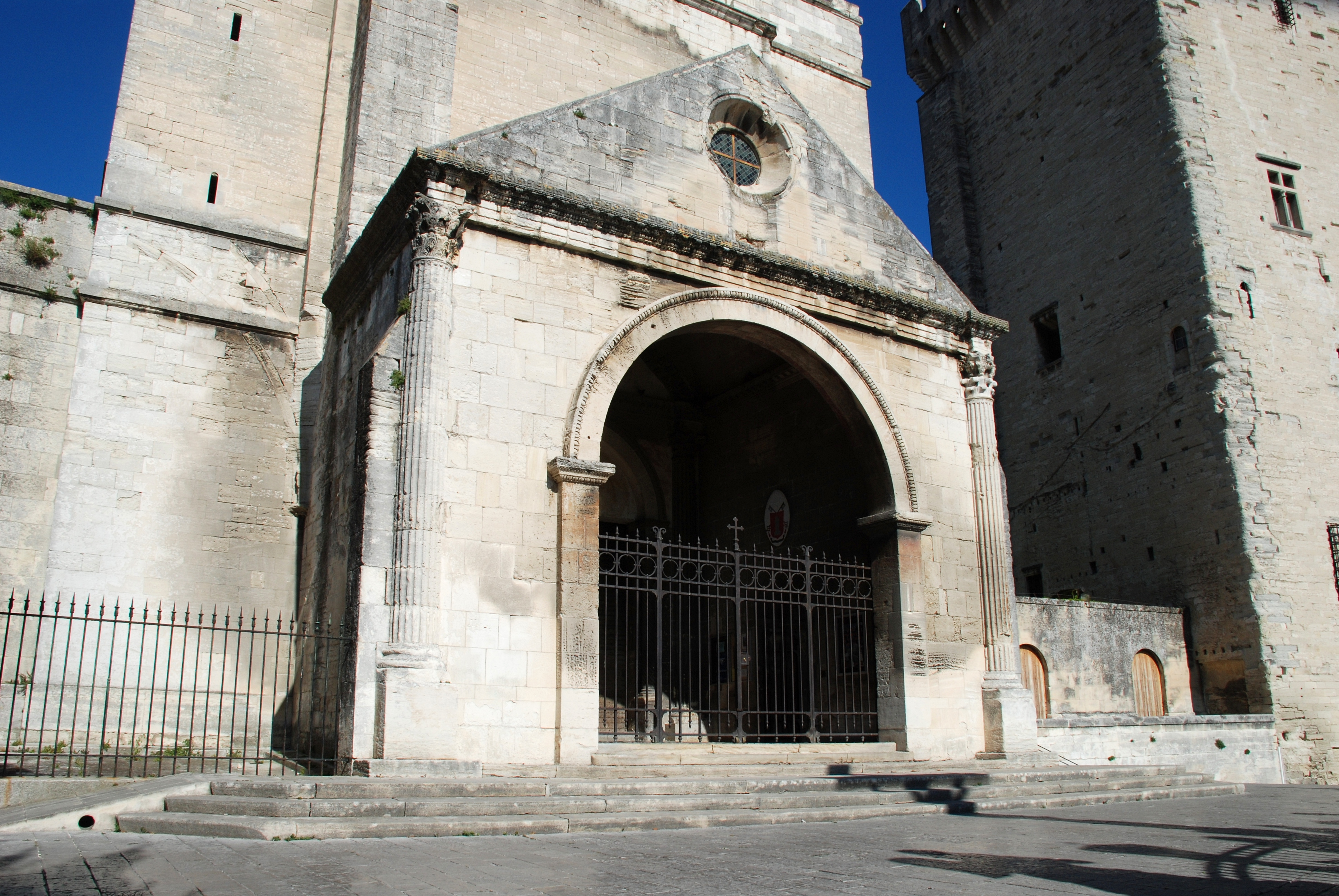 France - Avignon - Notre-Dame-des-Doms : Porche à l'antique